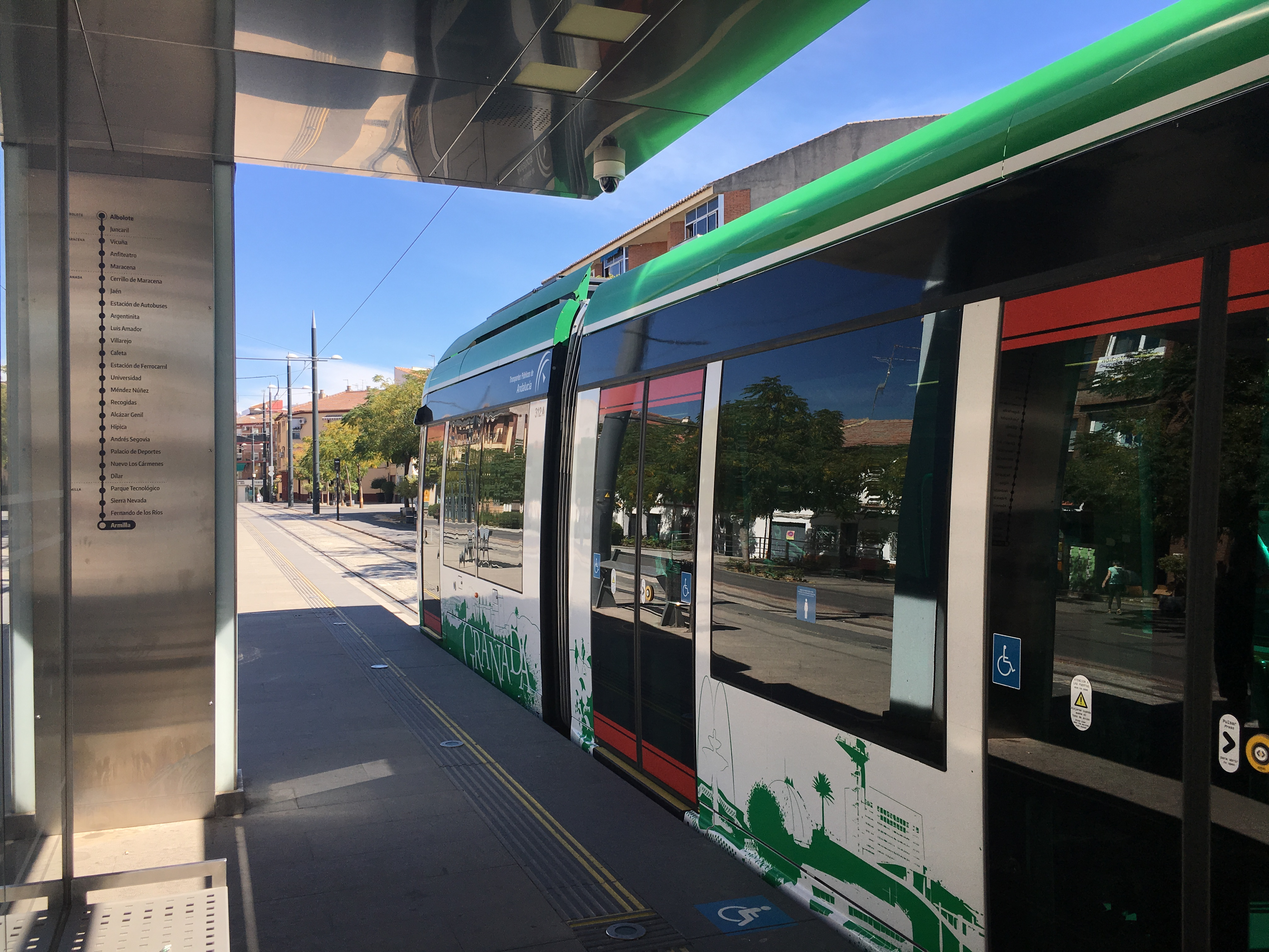 Unidad del Metro de Granada en la Estación de Armilla